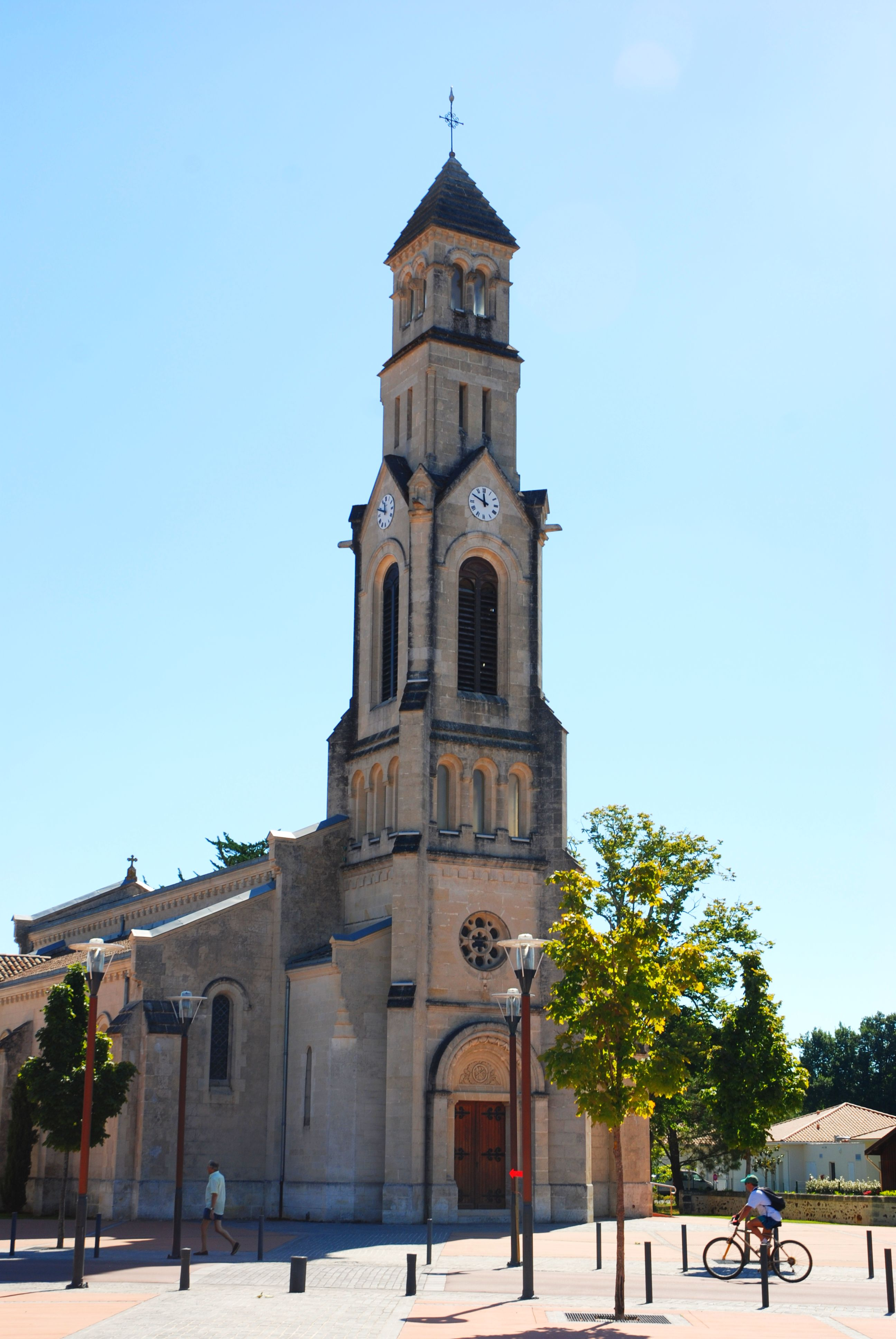 Kirche von Le Porge im Südwesten Frankreichs